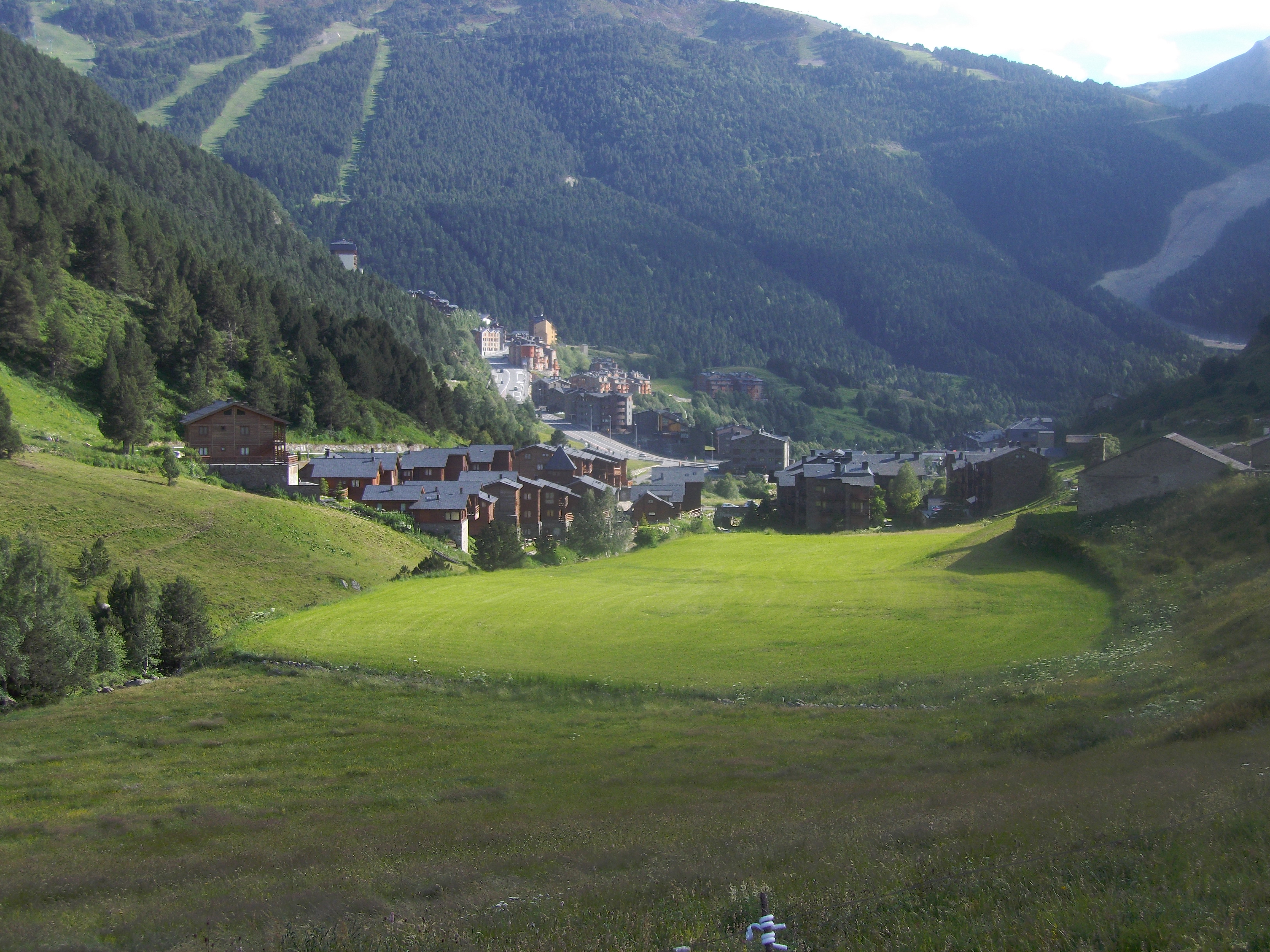 Entrada de la vall d’Incles